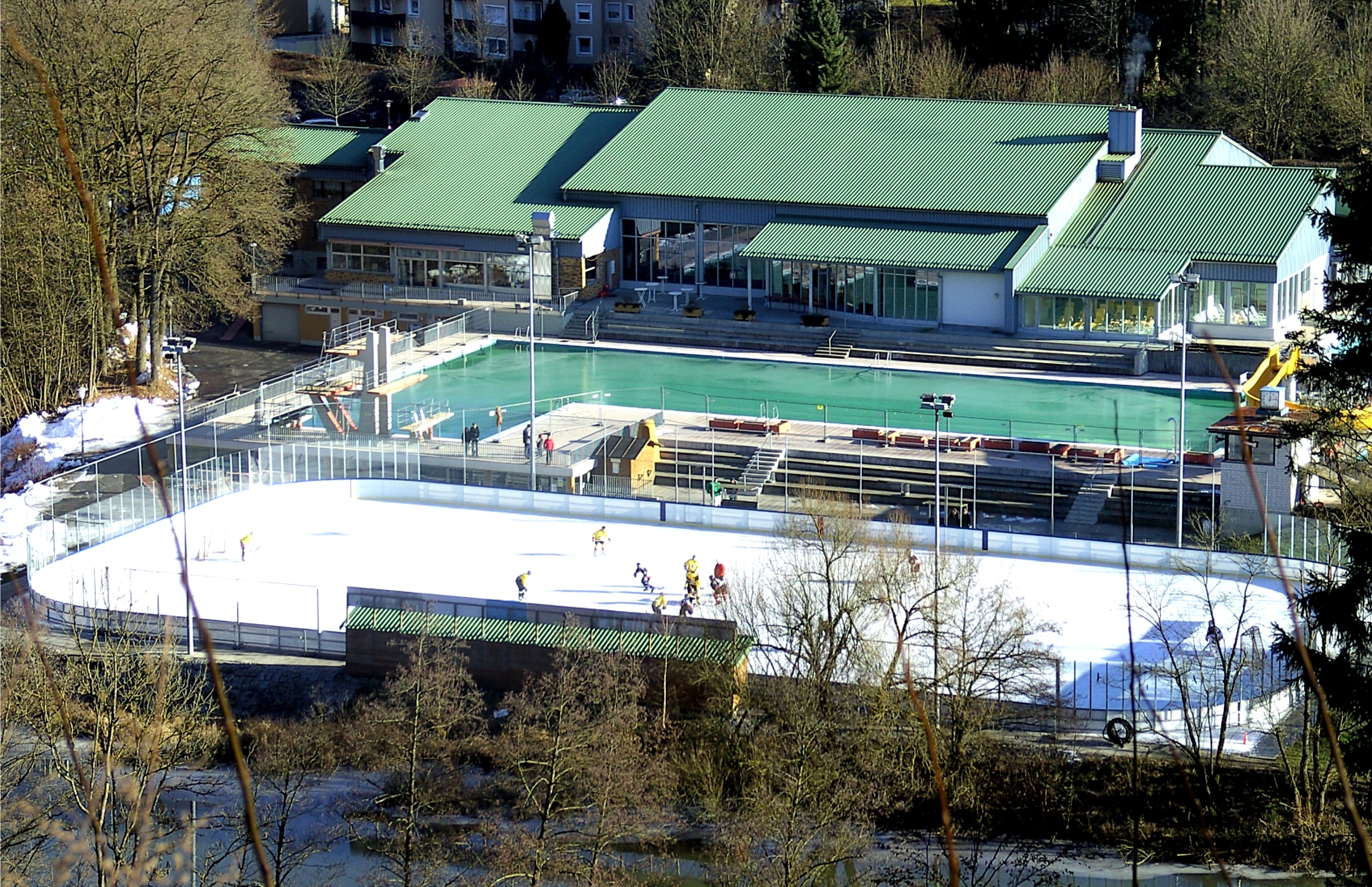 Das Erholungszentrum Vilshofen mit Hallenbad, Solebad, Dampfbad, Saunabereich, Ruhe- und Aufenthaltsräumen, Kleinkinderbereich, Kaffeebar, Eisbahn (unüberdacht) und Restaurant.